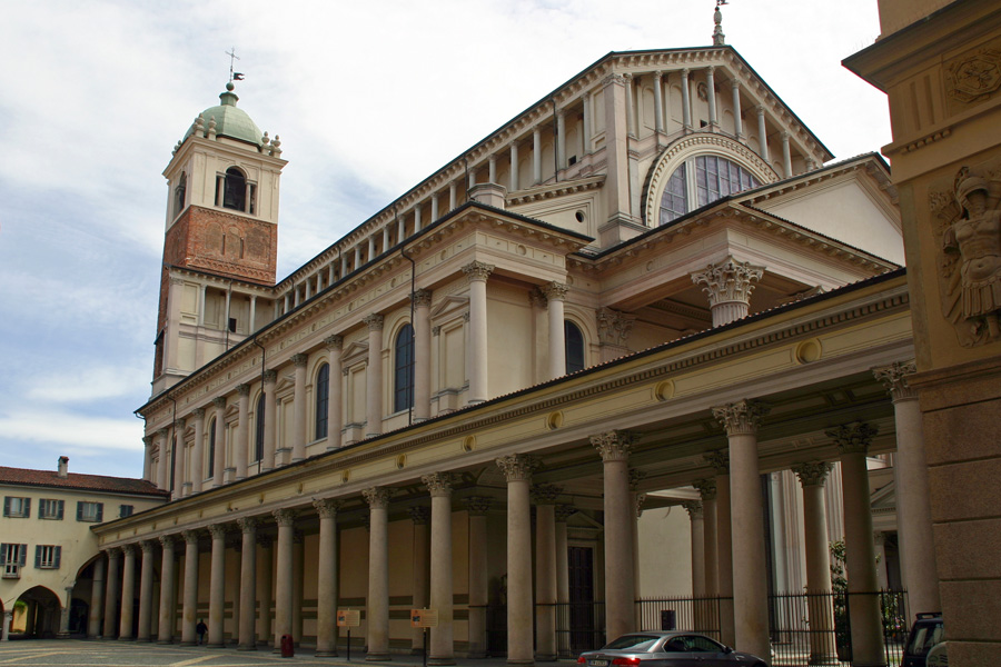 Veduta del Duomo di Novara da Piazza della Repubblica